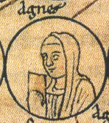 Agnès de Bourgogne